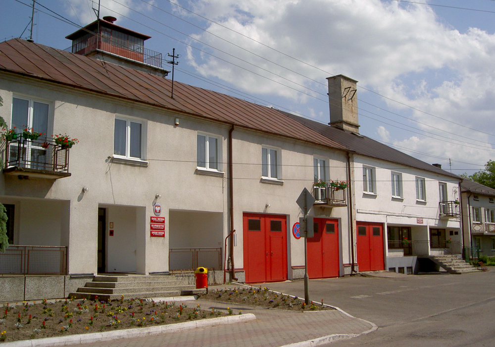 Tarnogród, Poland • Urząd Miasta i Gminy / City Council